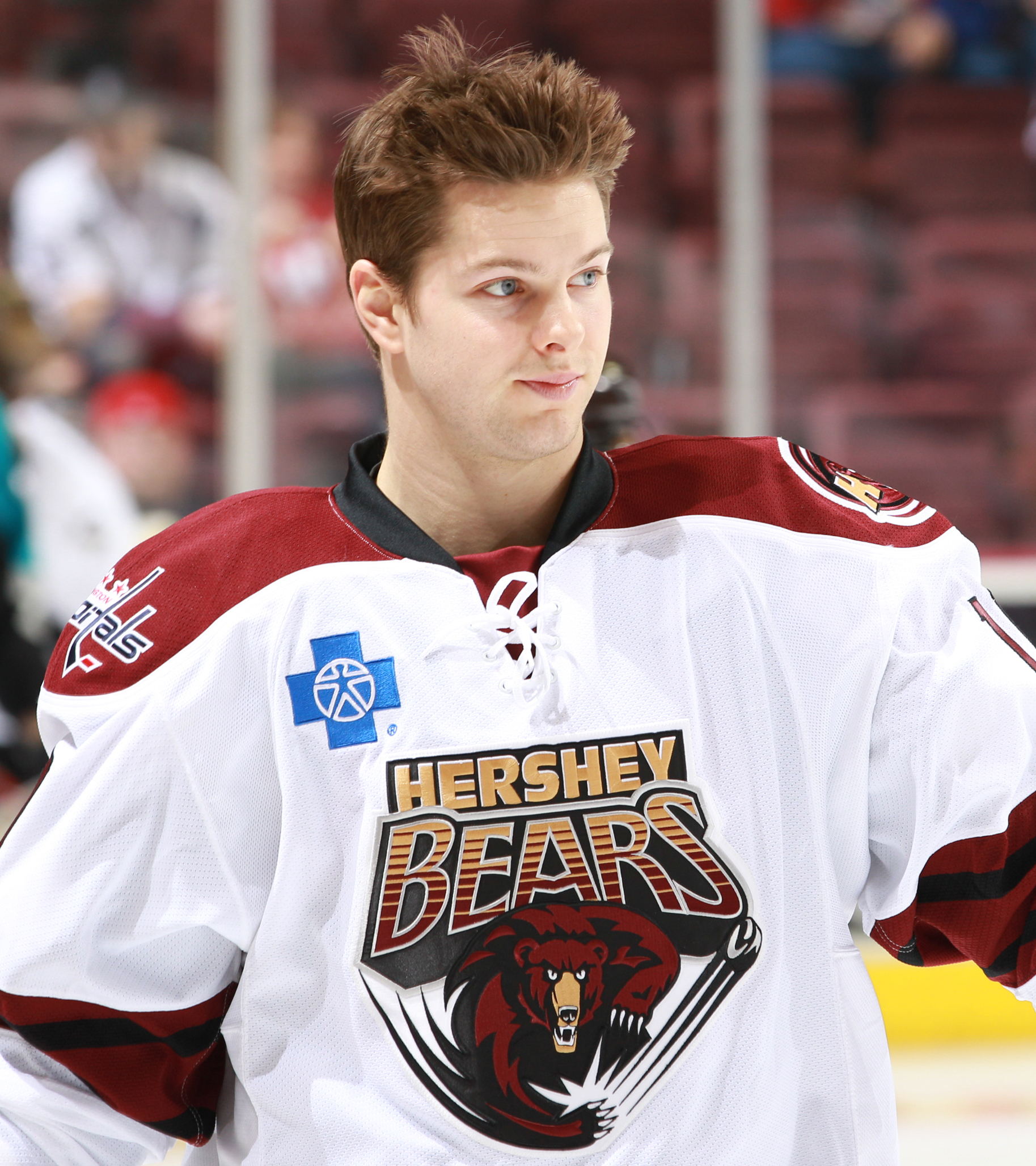 AS0130_1272